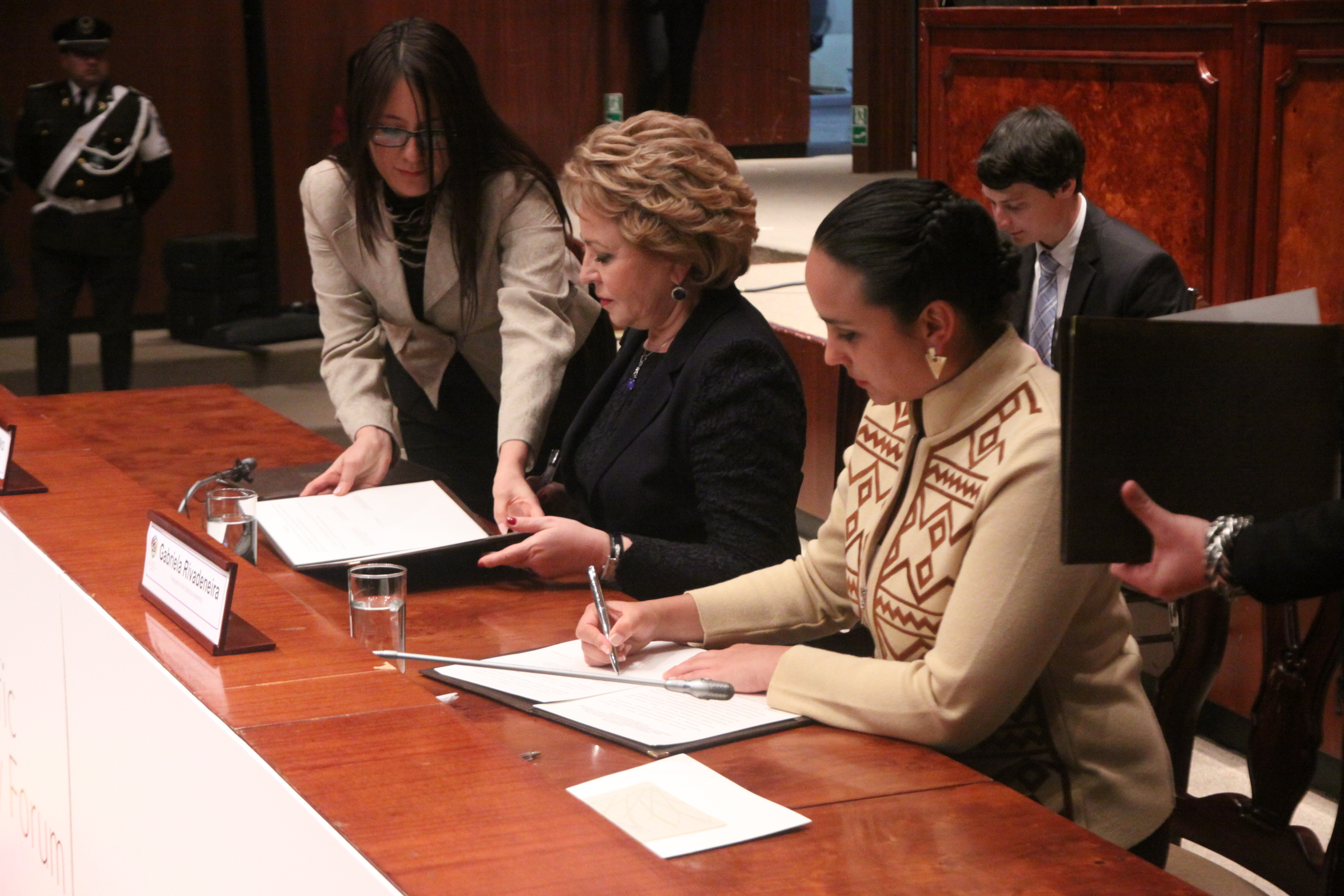 Quito, 12 enero de 2015.- Gabriela Rivadeneira y Valentina Matvienko ofrecen rueda de prensa y suscripción del Acuerdo de Cooperación entra la Asamblea Nacional de la República del Ecuador y el Consejo de Federación de la Asamblea Federal de la Federación de Rusia Fotografía: Hugo Ortiz / Asamblea Nacional